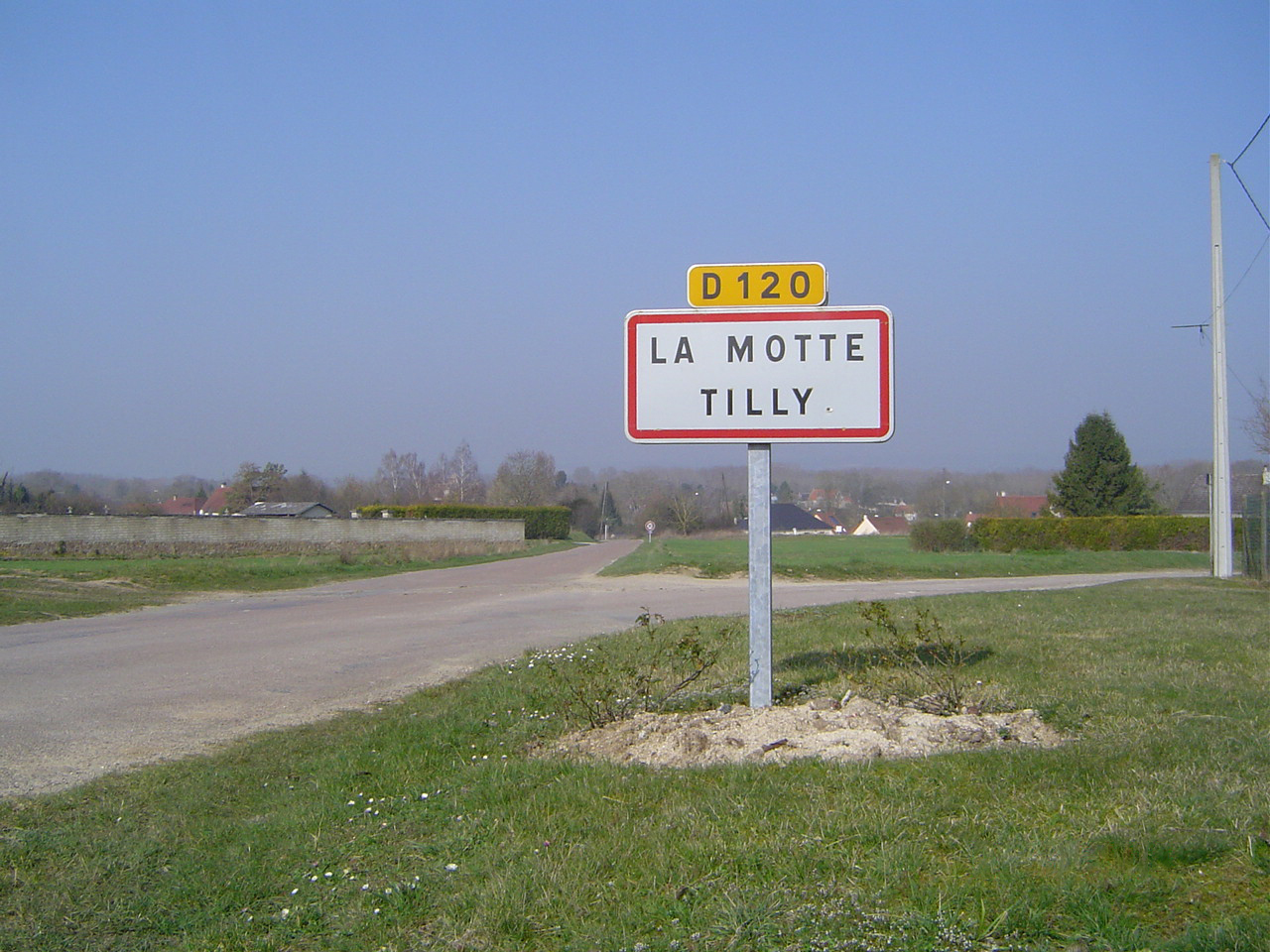 La Motte-Tilly - Entrée